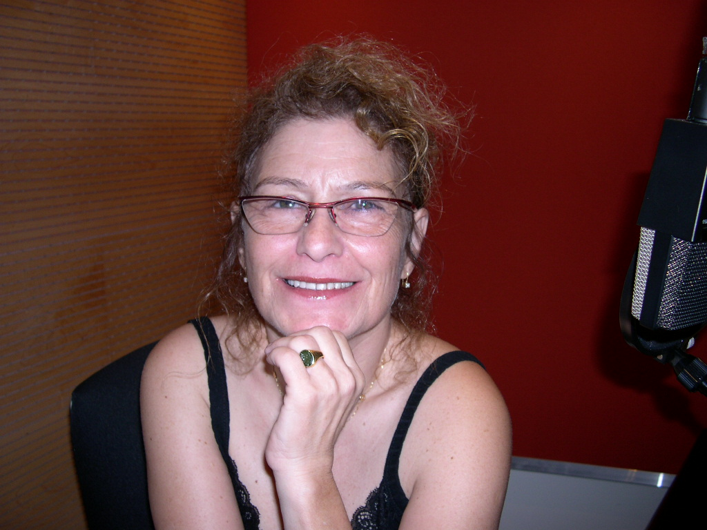 תיאור טל השילוני מקור - שפ"מ תאריך יצירה לא ידוע יוצר - שפ"מ אישורים והיתרים היוצר התיר לי להשתמש בתמונה